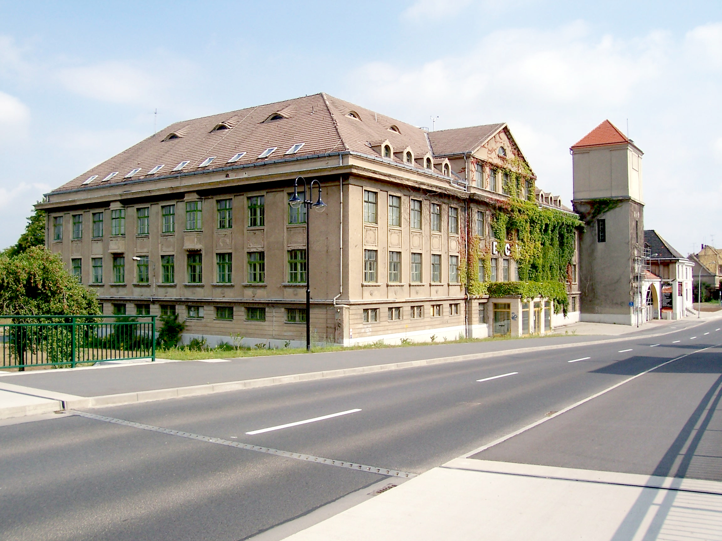 Verwaltungsgebäude des Eilenburger Chemiewerkes in der Ziegelstraße, links vom Gebäude verlief früher eine Werksbahnverbindung, ein Torpfeiler an der Hauswand und eine Laterne am Gebäude zeugen noch davon